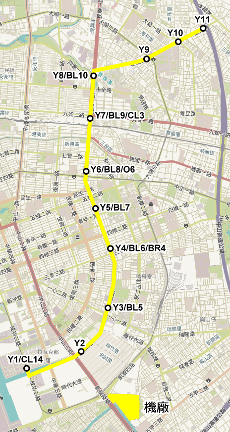 高雄捷運 輕軌黃線 最初規劃